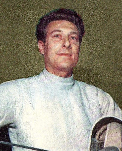 Lo schermidore azzurro Giuseppe Delfino